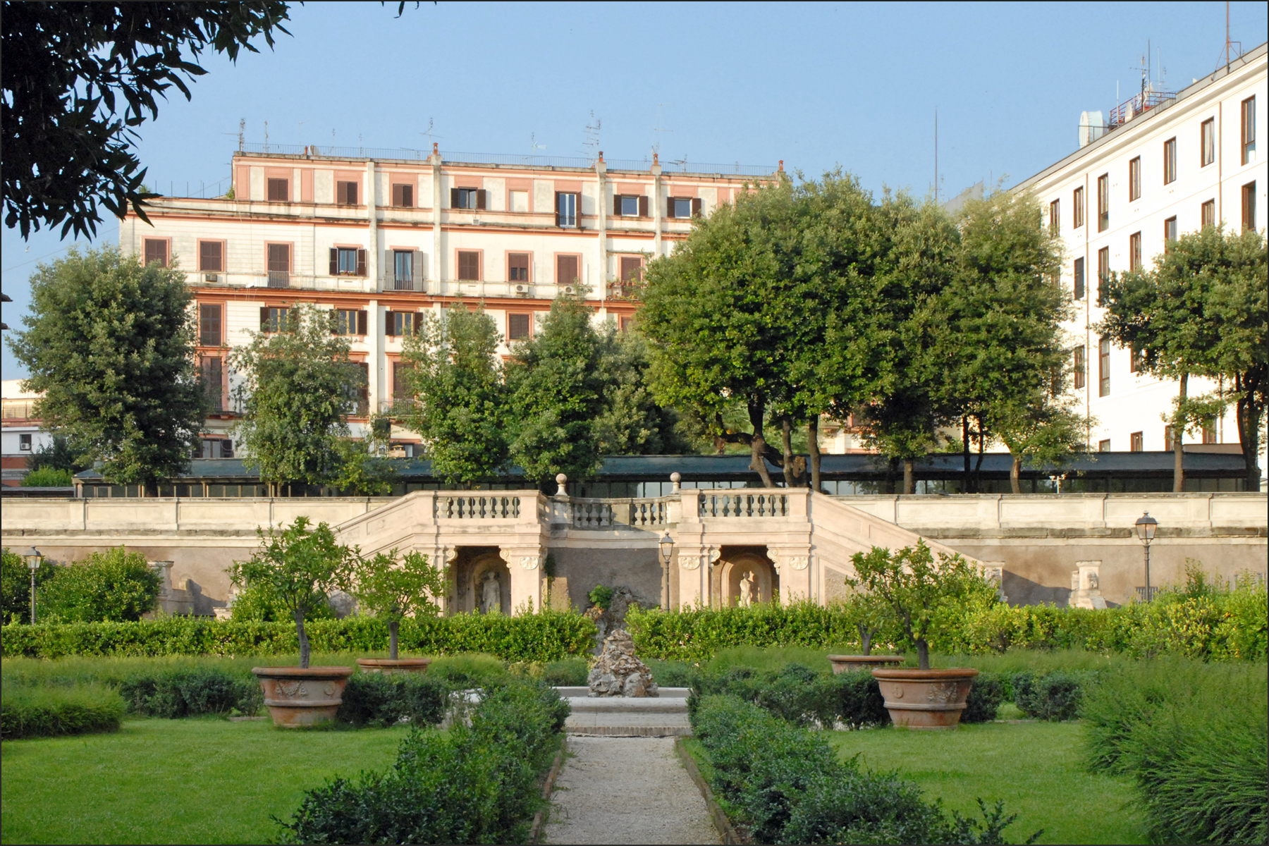 Le jardin et les bâtiments autour du palais Barberini (détail) Le palais a été conçu en 1625 par Carlo Maderno, à la demande du Cardinal Maffeo Barberini, devenu Pape en 1623 sous le nom d'Urbain VIII. La forme du bâtiment est celle d'une vaste villa avec deux ailes en H qui s'avancent dans des jardins. Ces jardins sont entourés de bâtiments récents comme on le voit sur la photo. Site officiel de la Galerie du palais Barberini